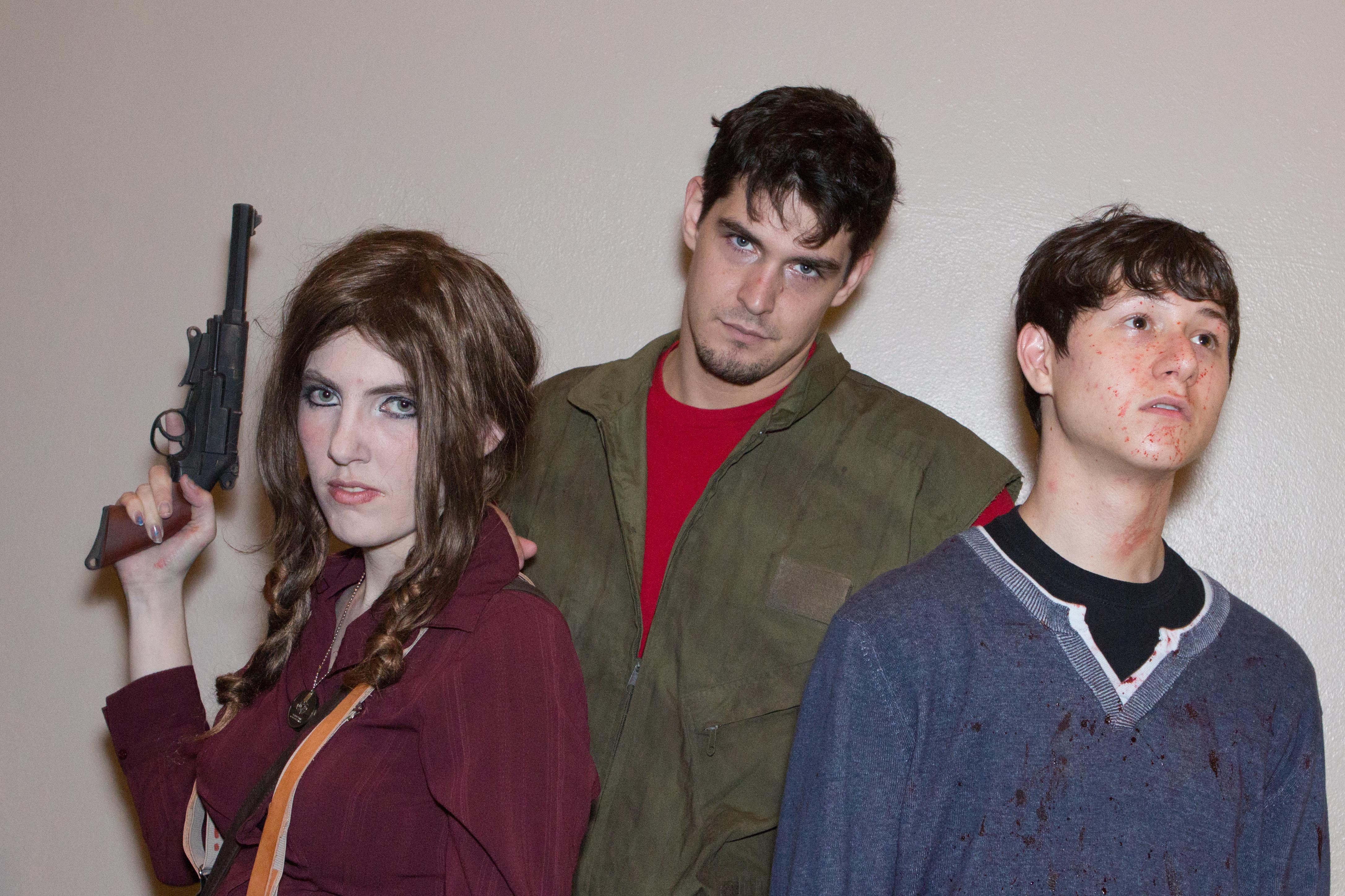 Cosplay at Dragon*Con 2013.